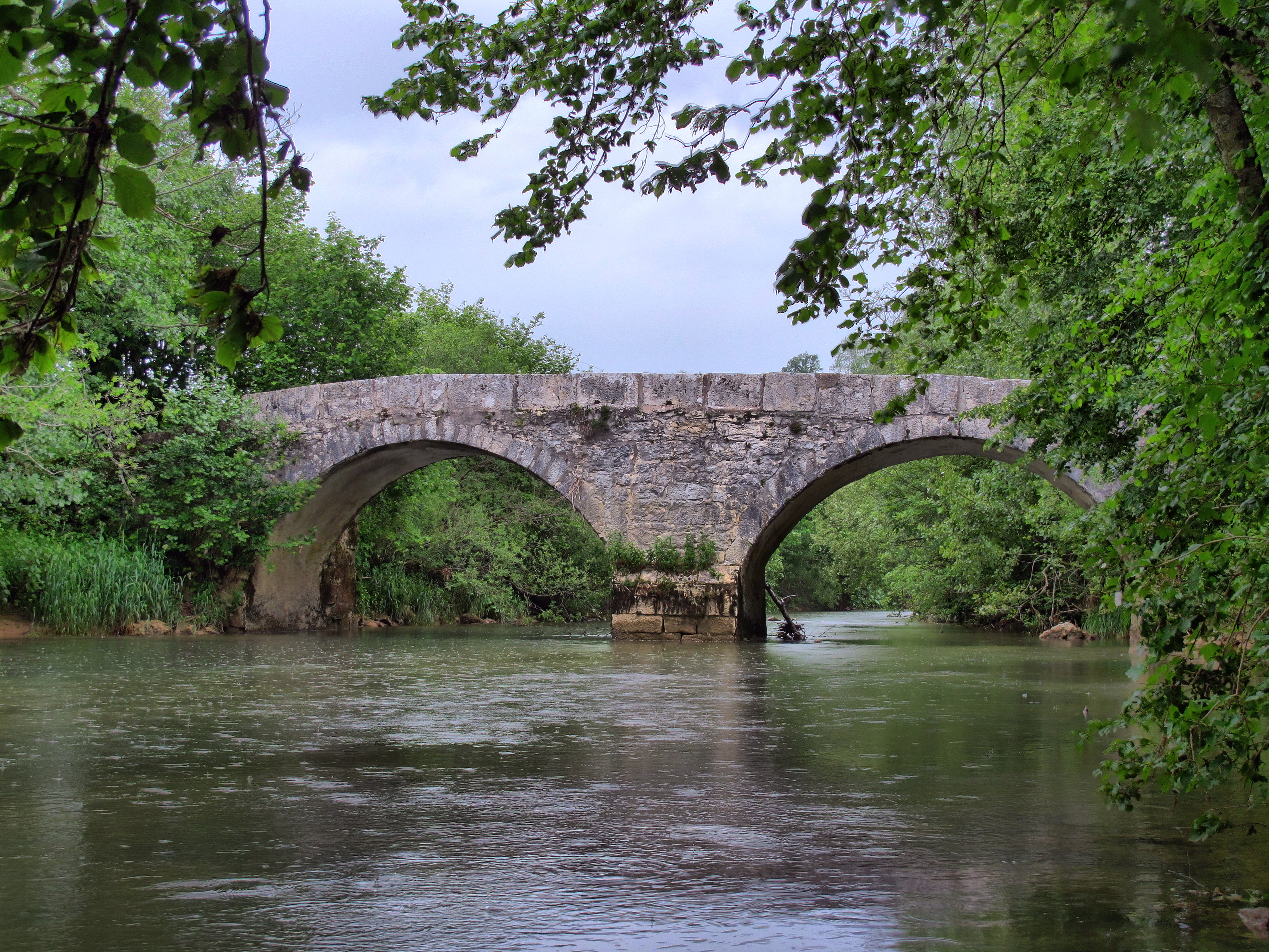 Inscrit aux monuments historiques sous le numéro : PA25000034